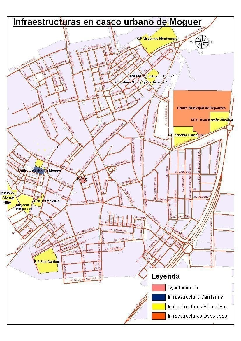 Plano de ubicación infraestructuras, en el actual casco urbano de Moguer (España).